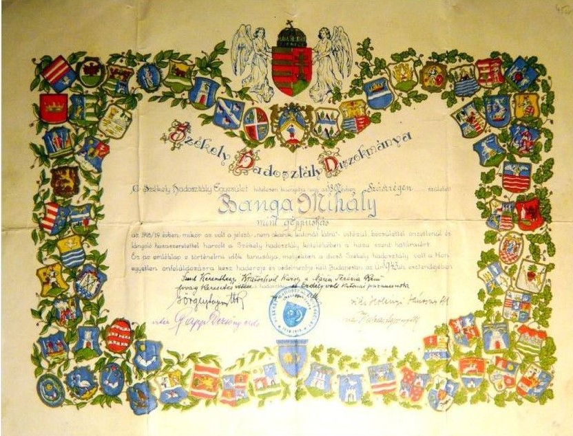 Székely Hadosztály. Forrás